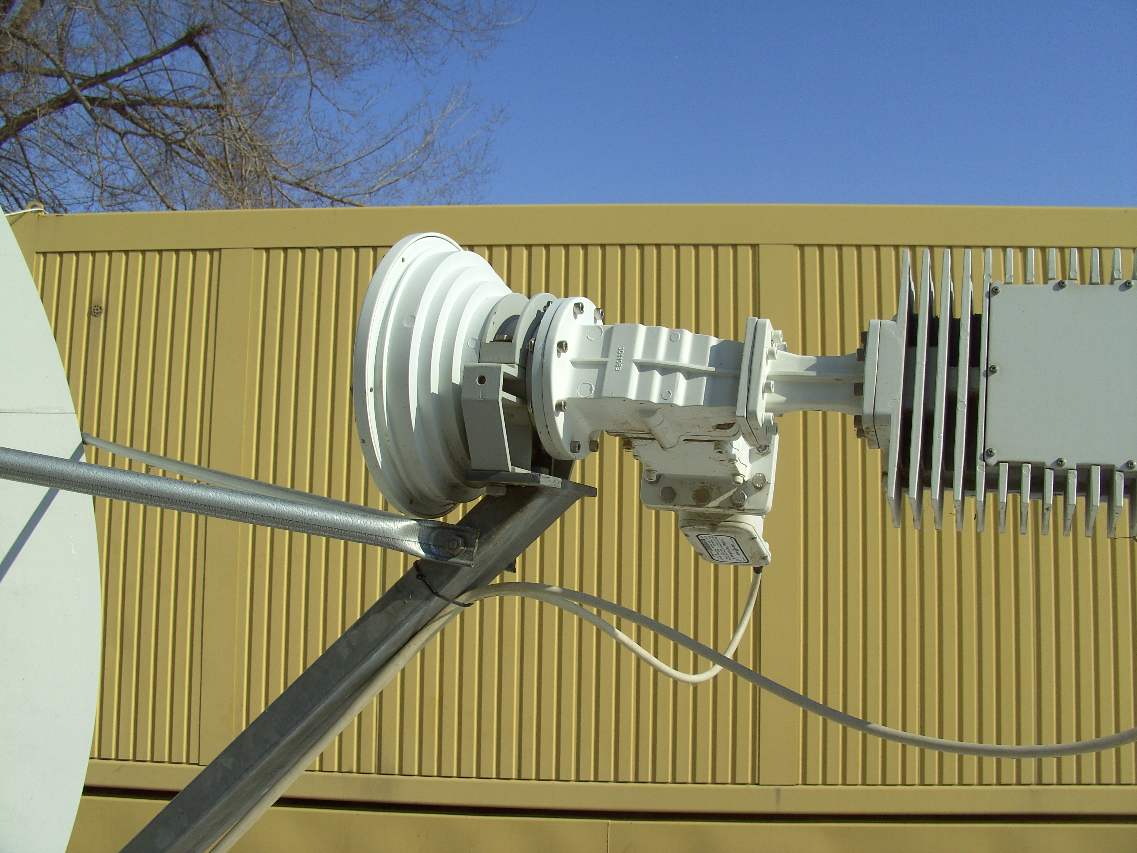 Satellitenantenne für Kommunikation mit einem Rillenhornstrahler und einem orthomode Transducer